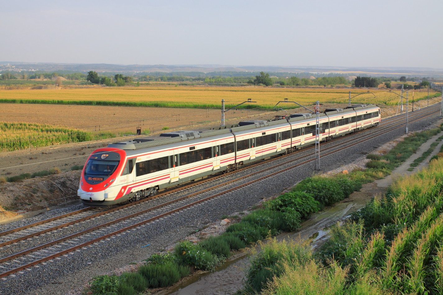 Seseña. UT 465 con Cercanias Aranjuez a Madrid-Chamartin.